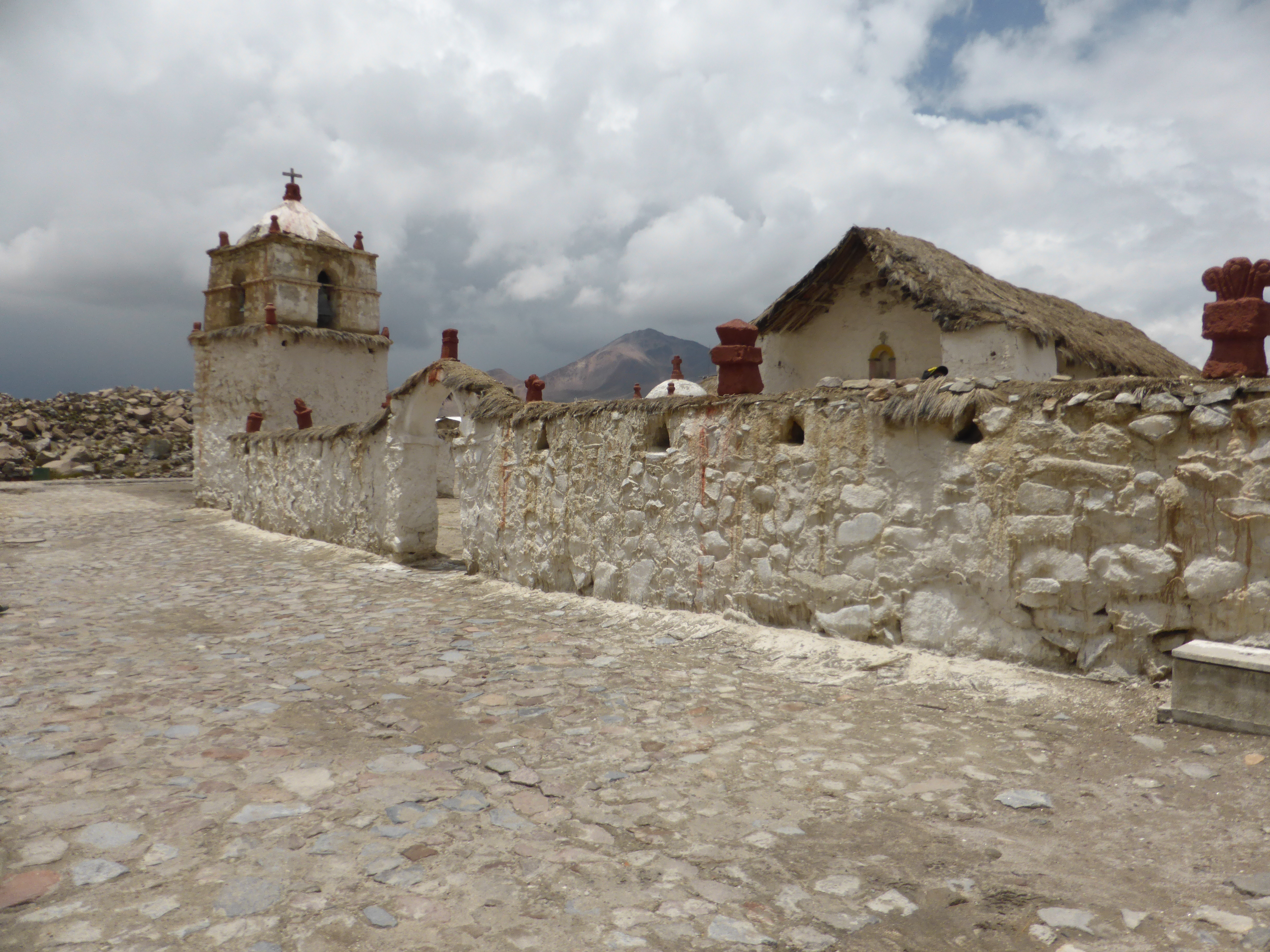 Parinacota es una localidad de la comuna de Putre, Provincia de Parinacota.